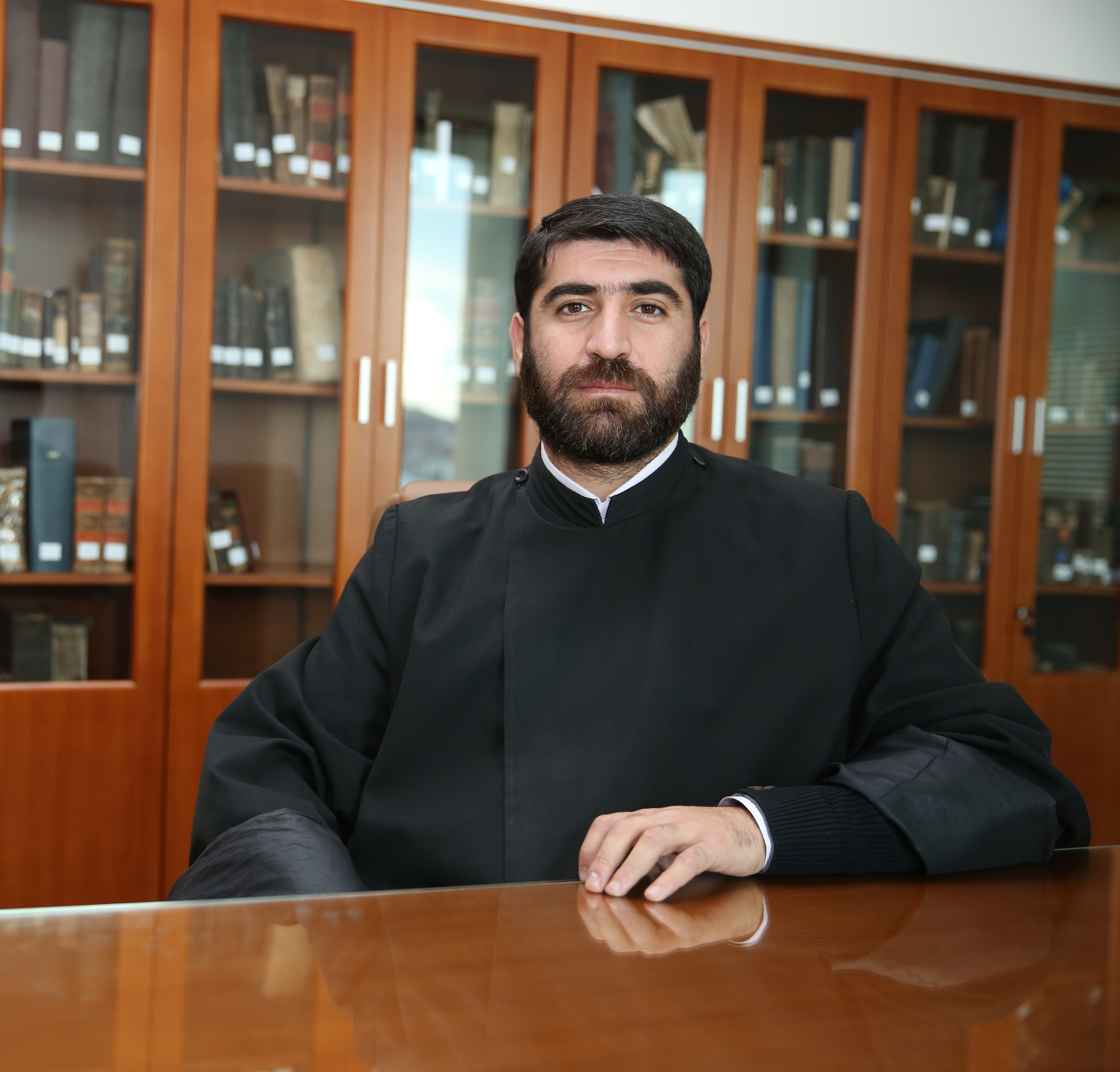 Արժանապատիվ Արարատ քահանա Պողոսյանի լուսանկարն է